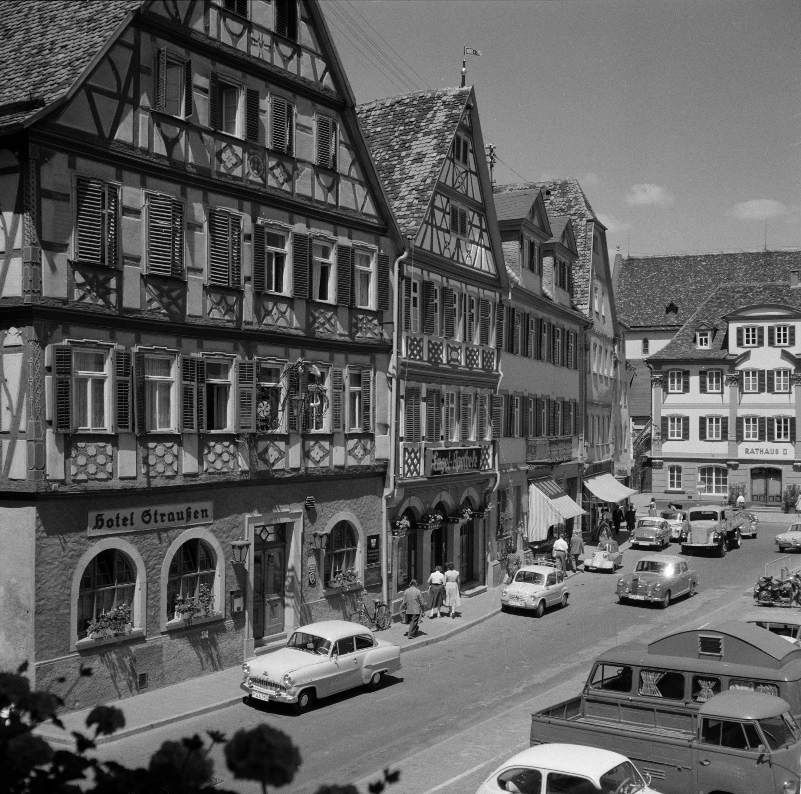 Collectie / Archief : Fotocollectie Van de Poll Reportage / Serie : Hohenloher Land Beschrijving : Gezicht op het marktplein van Bad Mergentheim met links Hotel StrauÃŸen en rechts het Raadhuis Datum : 1960 Locatie : Bad Mergentheim, Baden-WÃ¼rttemberg, Duitsland, West-Duitsland Trefwoorden : gemeentehuizen, stadsbeelden, straatbeelden, winkels Fotograaf : Poll, Willem van de Auteursrechthebbende : Nationaal Archief Materiaalsoort : Negatief (6x6) Nummer archiefinventaris : bekijk toegang 2.24.14.02 Bestanddeelnummer : 254-4529